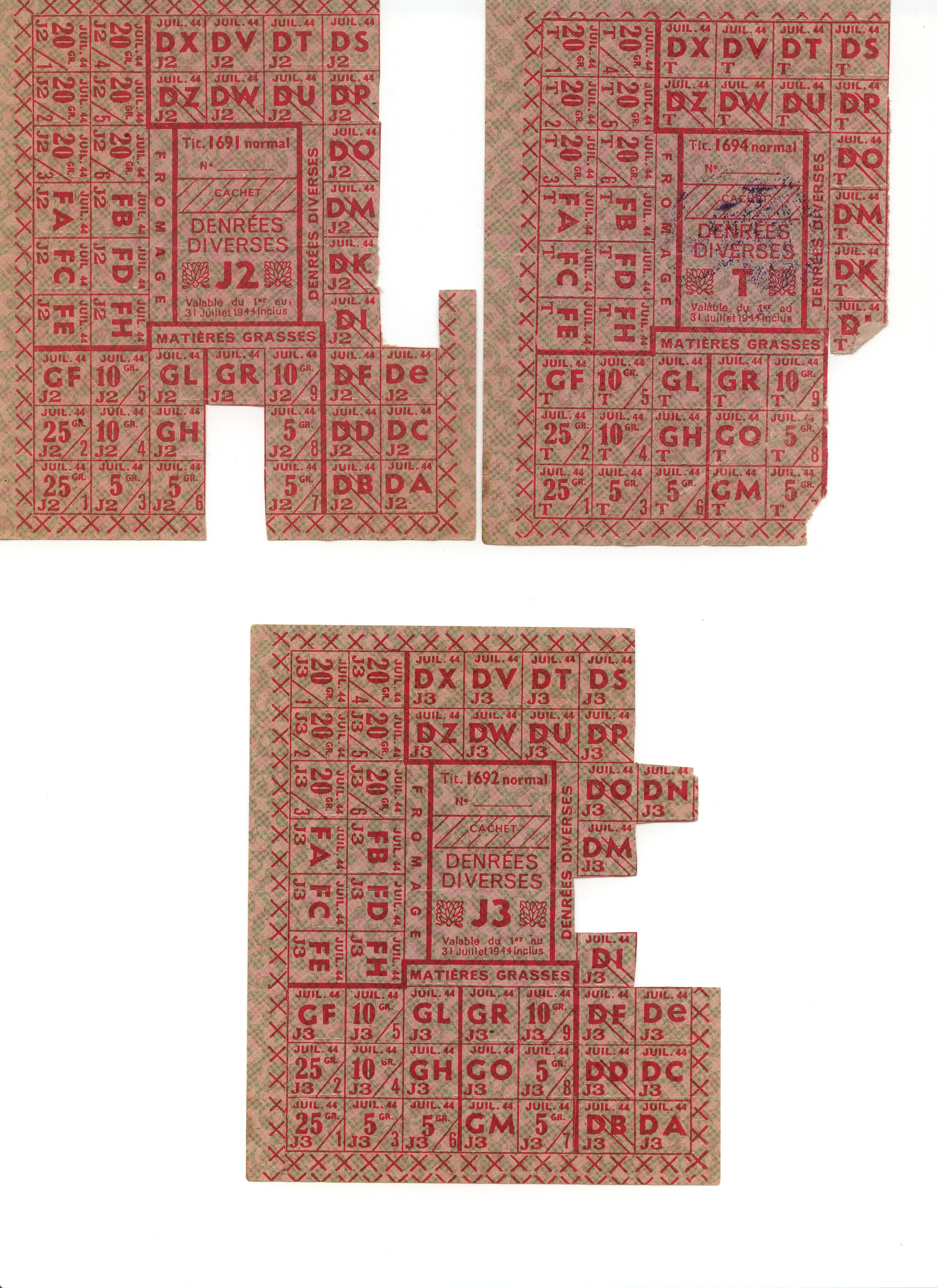 Tickets de rationnement français – J2, J3, T, denrées diverses, Seconde Guerre mondiale, juillet 1944.